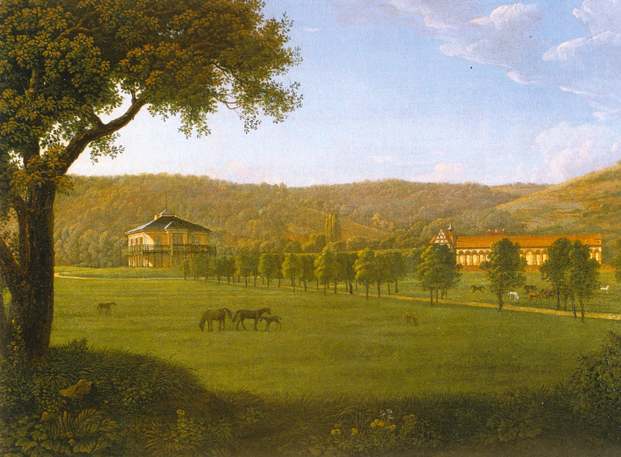 Gut Weil bei Esslingen, von Giovanni Salucci zwischen 1818 und 1820 für König Wilhelm I. errichtet Privatbesitz